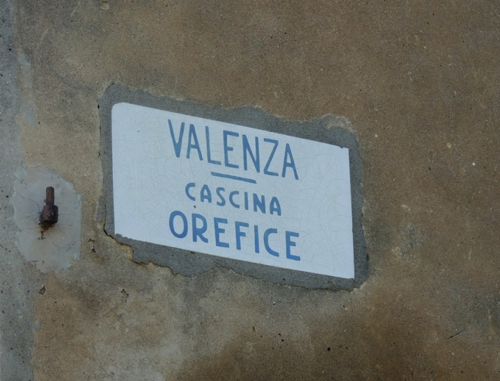 Antica targa Cascina dell'Orefice, rilevata in fase di ristrutturazione dell'edificio